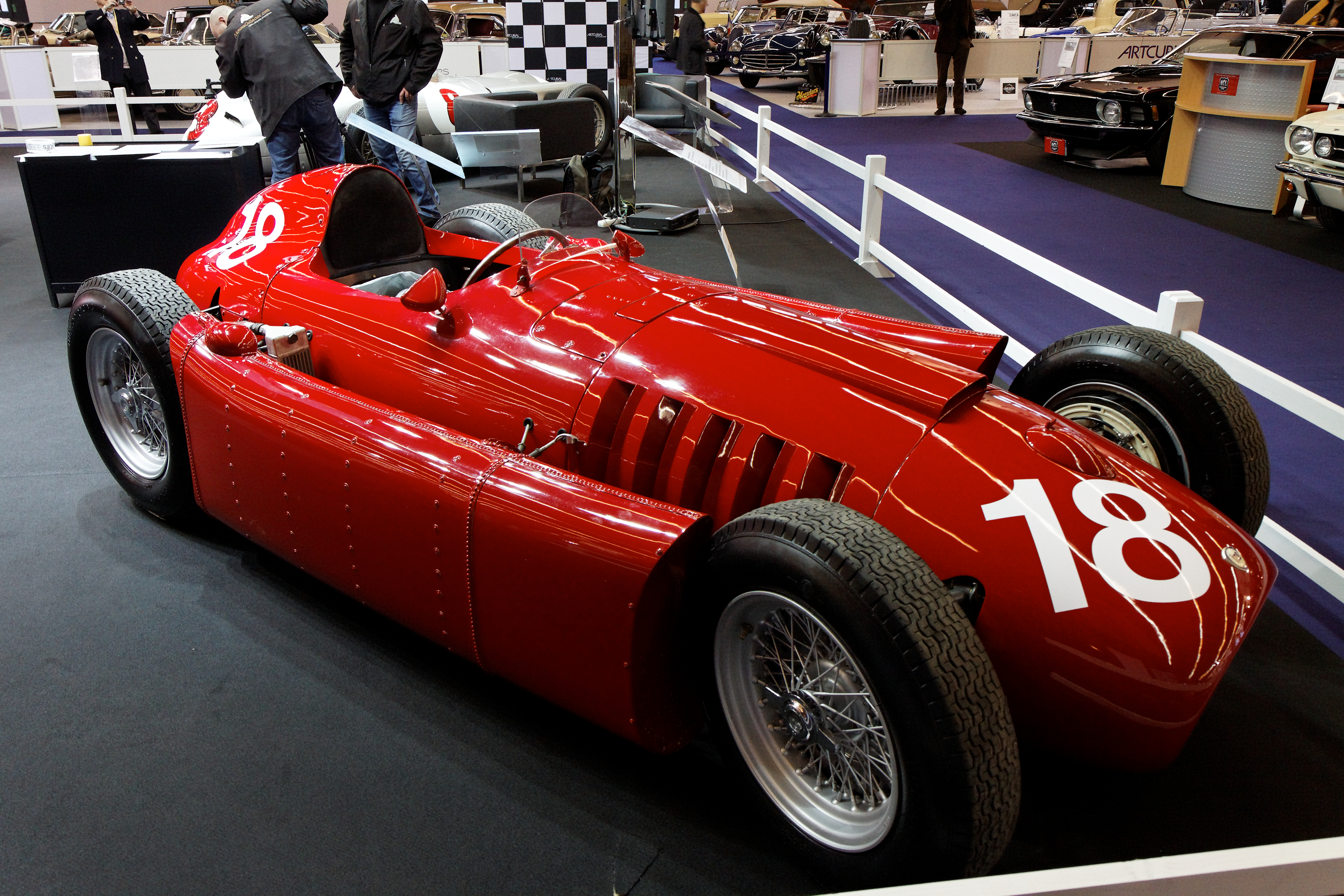 Photographie prise lors du salon rétromobile 2011 à Paris, porte de Versailles.